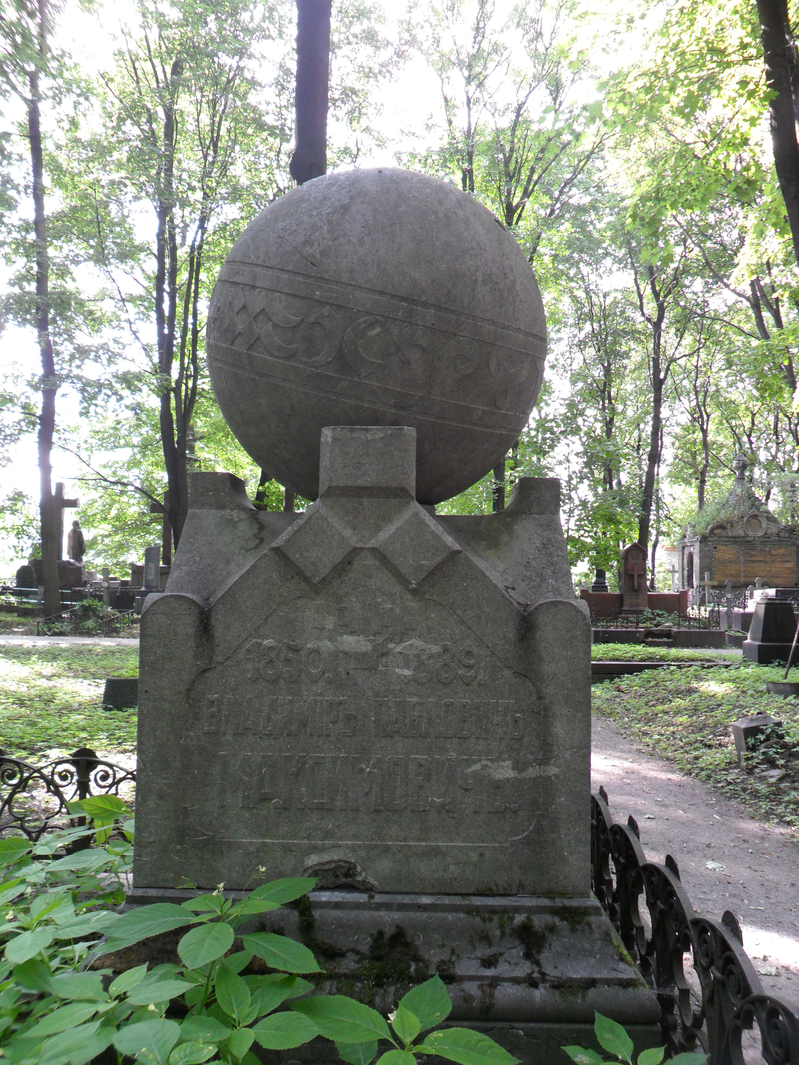 Могила русского математика Владимира Павловича Максимовича на кладбище Новодевичьего монастыря в Санкт-Петербурге